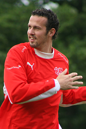 Marco Streller im Trainingslager der Schweizer Fussballnationalmannschaft vor der Euro 2008